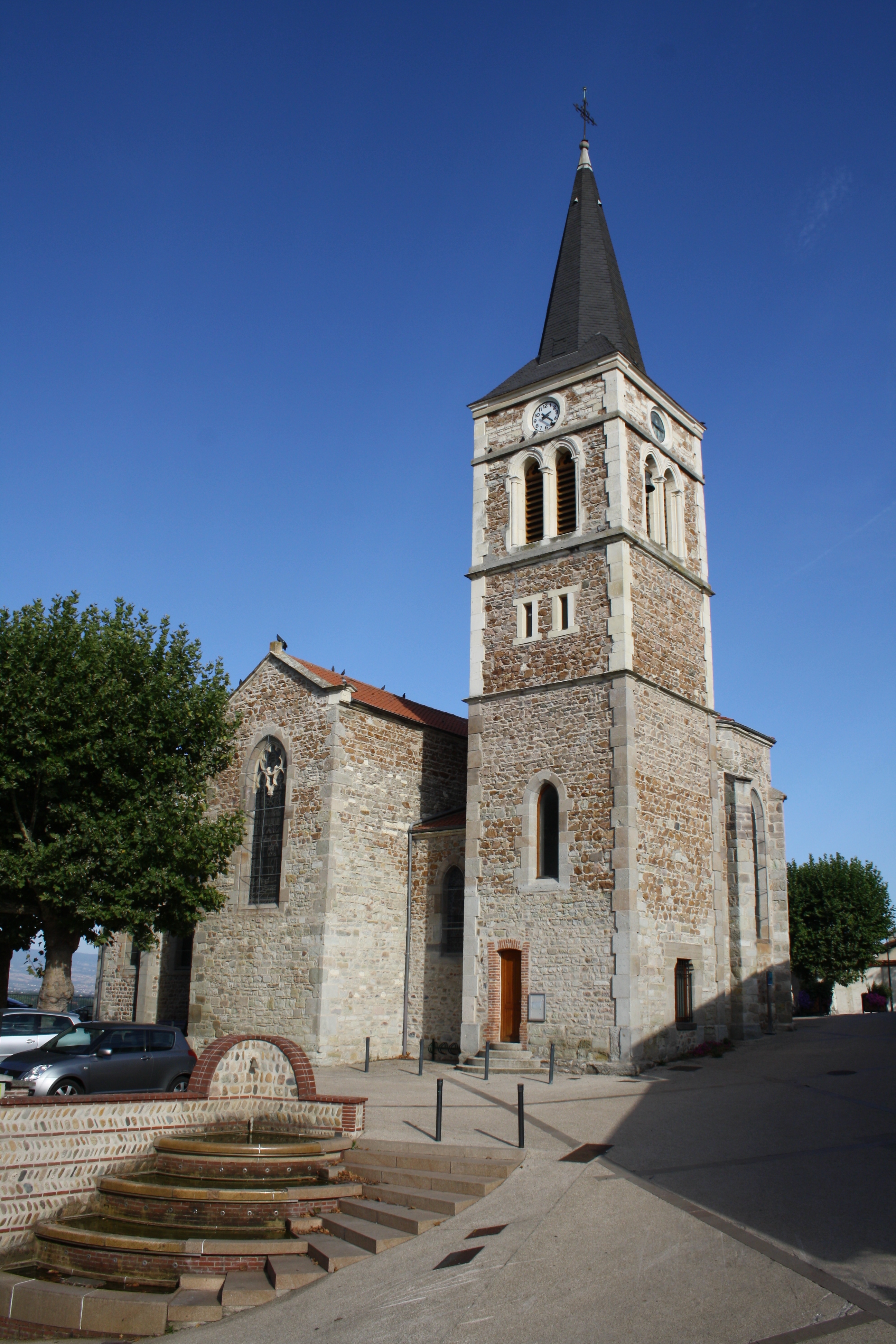 Église Saint Laurent (Andrézieux-Bouthéon, quartier de Bouthéon). Construite en 1881 à l'emplacement d'une église du XIIe siècle.